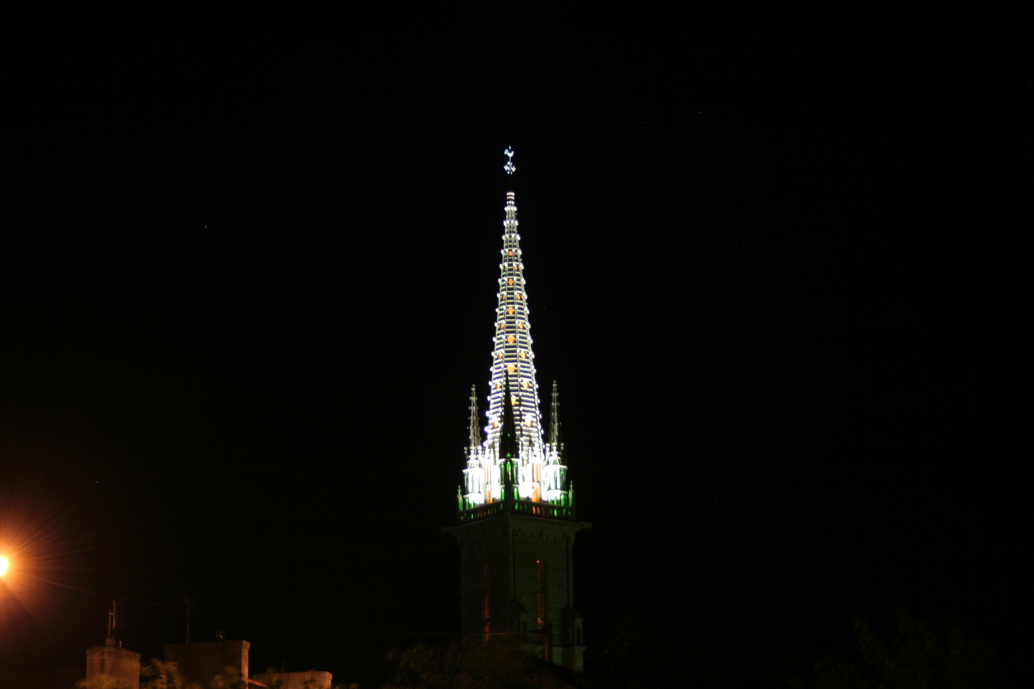 Le clocher de l'église de Plouescat éclairé la nuit. {en} The bell tower of Plouescat at night.